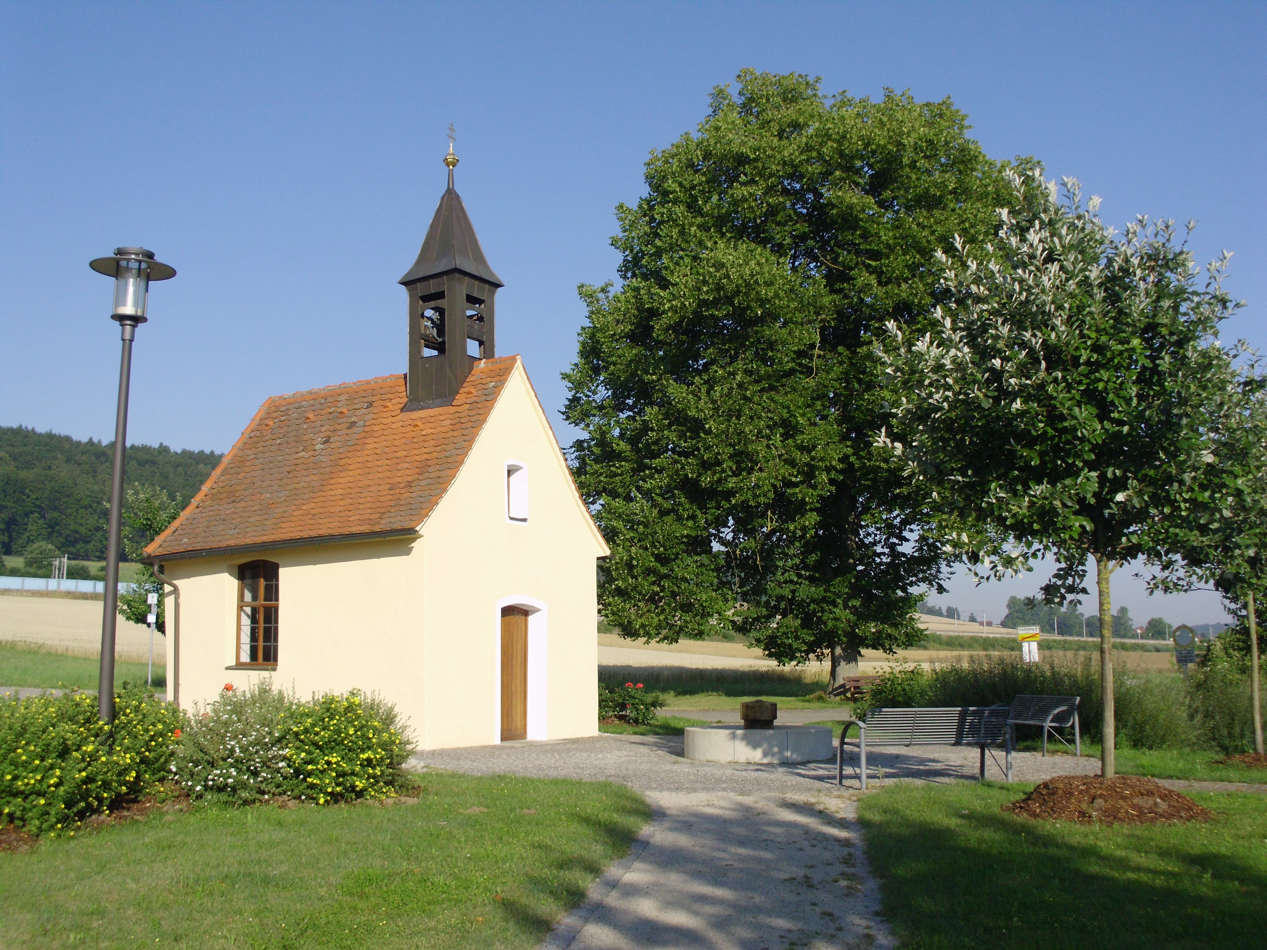 Günzenhofen, Ortsteil von Greding im mittelfränkischen Landkreis Roth in Bayern, Katholische Ortskapelle von circa 1700